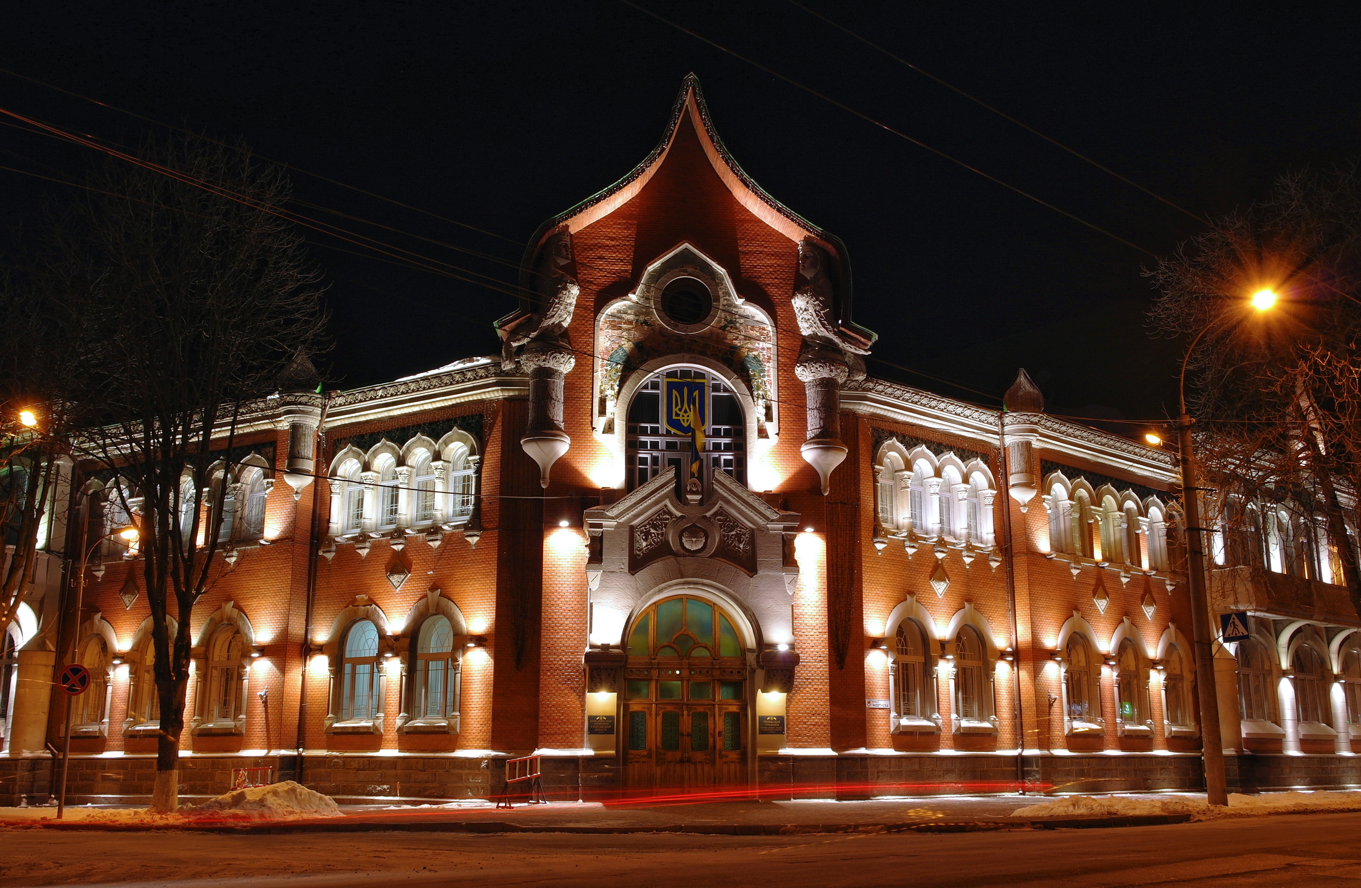 Полтава, селянський банк